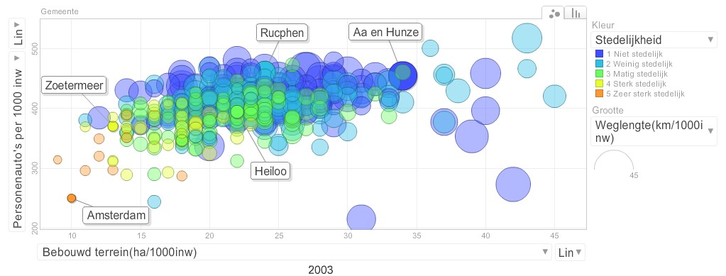 Invloed van stedelijkheid op milieu-aspecten